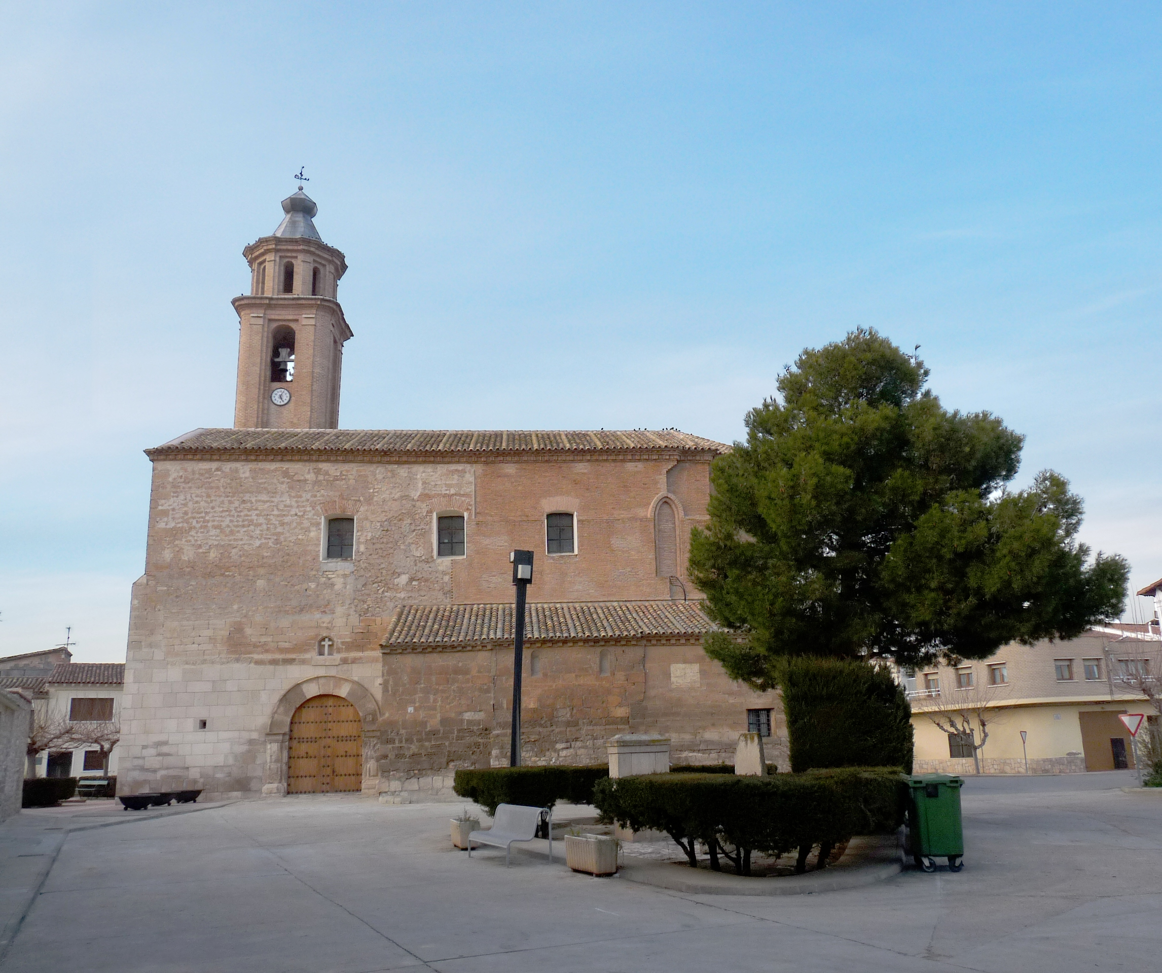 Candasnos - Iglesia de la Asunción de Nuestra Señora - Vista Lateral con Plaza de la Iglesia